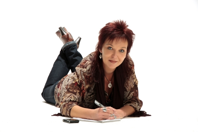 Autorin Anja Jantschik